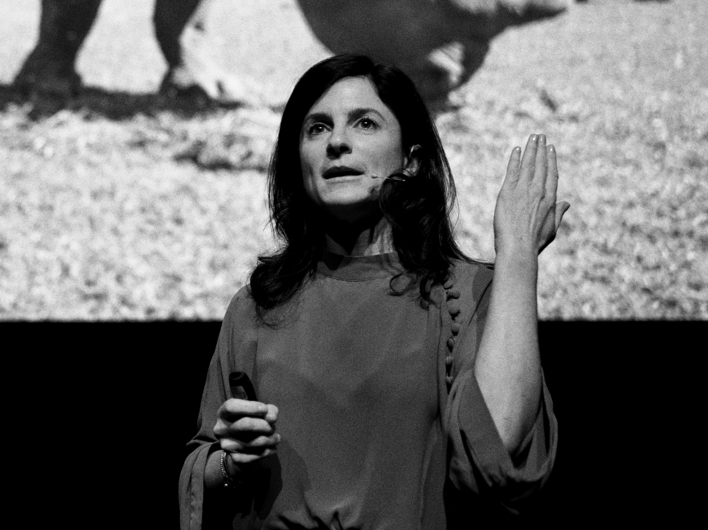 portrait d'Ami Vitale